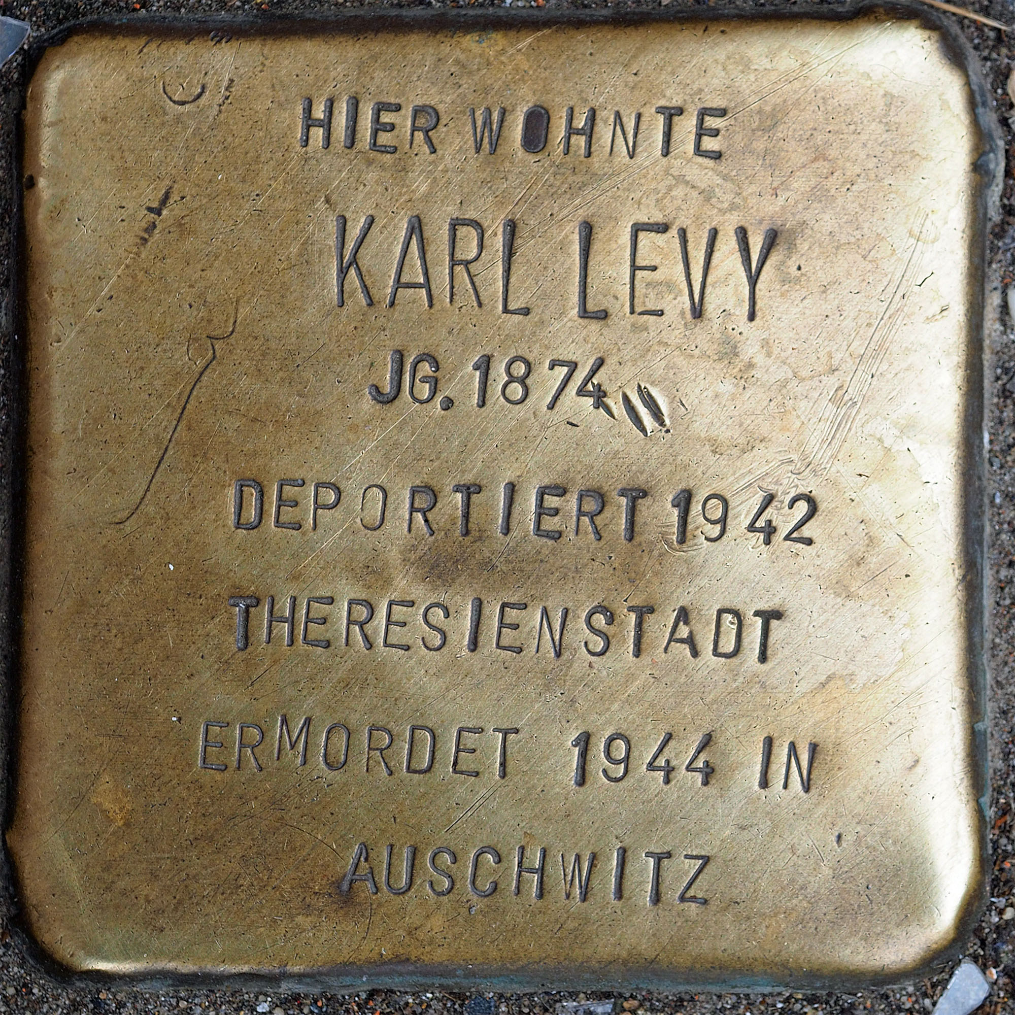 Stolpersteine MG: Levy, Karl